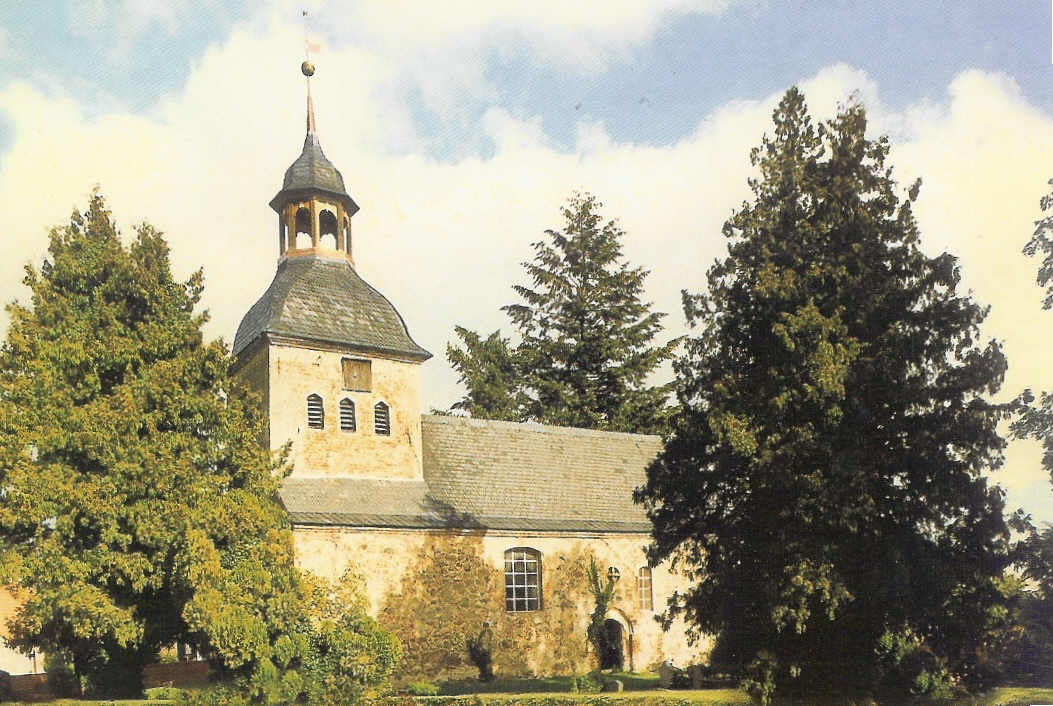 Kirche in Falkenberg